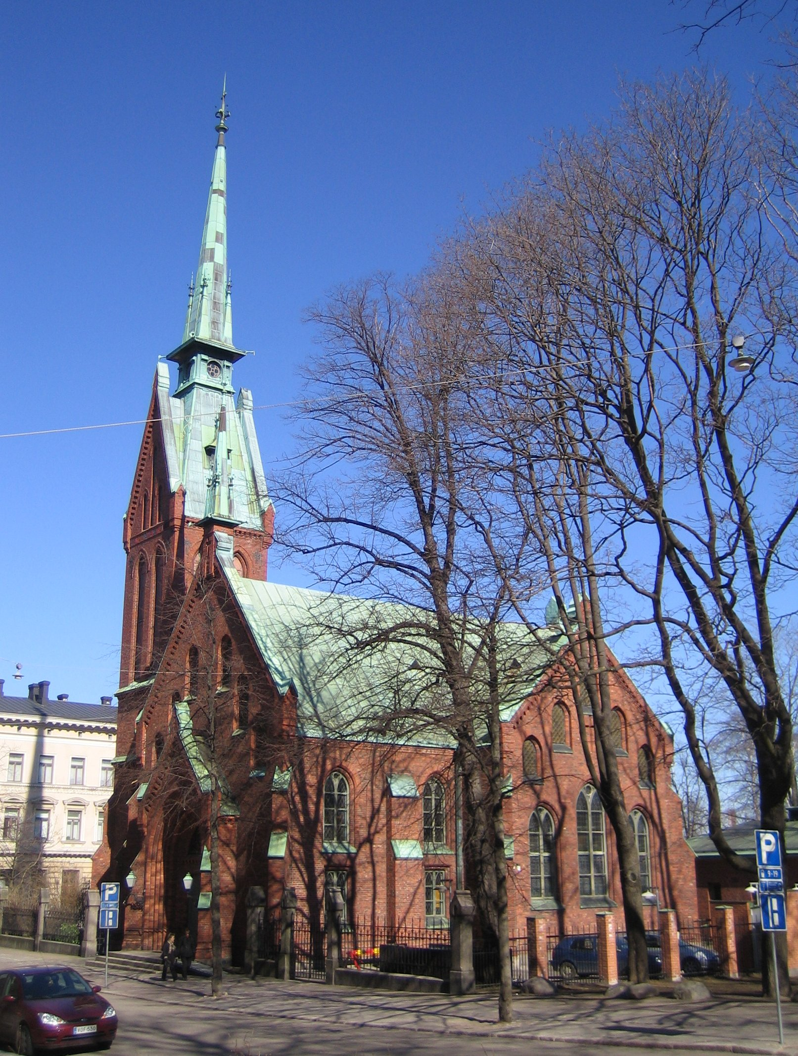 Saksalainen kirkko (German church), Bernhardinkatu 4 / Unioninkatu 1, Helsinki, Finland. Arkkitehti: Harald Bosse, C.J. von Heideken. Rakennusvuosi: 1864